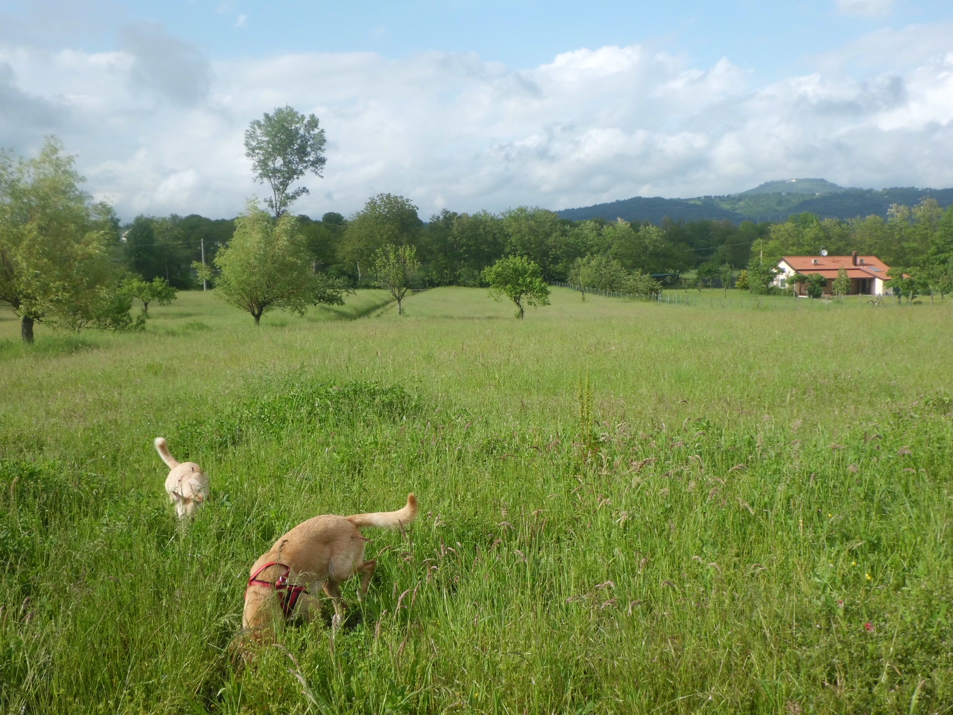 Campo coltivato, bello, uniforme, ritratto in una piovosa giornata a metà del mese di Maggio. I miei cani si divertono correndo nell'erba. Il sito è localizzato nella zona coltivata a cereali di Montelupone, Italia, nelle immediate vicinanze del fiume Calore.